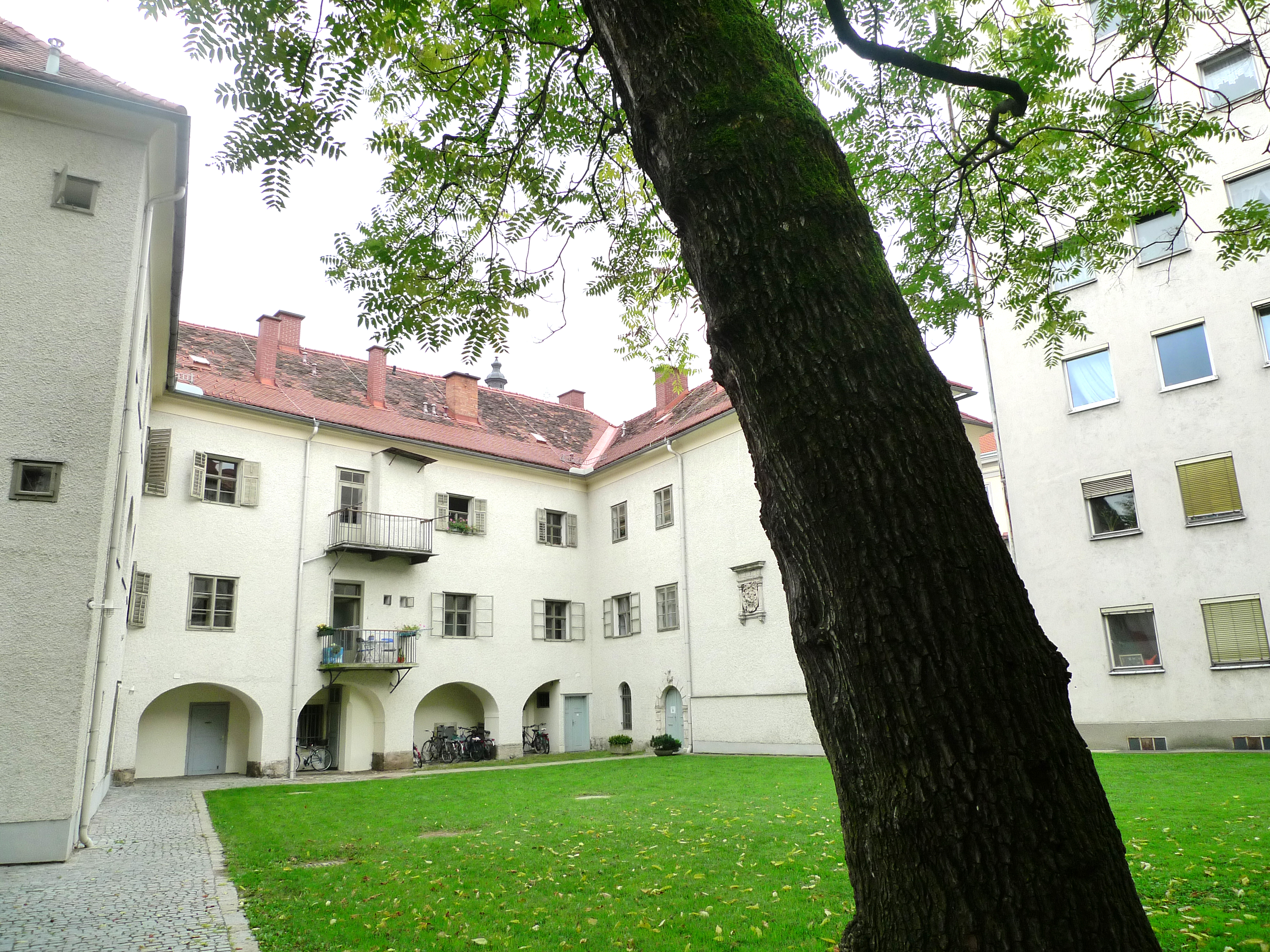 Ehem. Bürgerspital